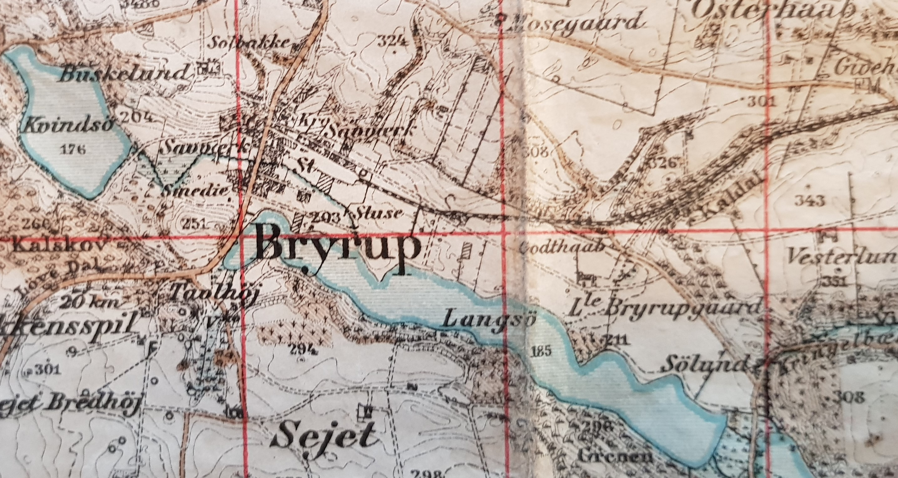 Foto af udsnit af Generalstabens Topografiske Kort trykt i 1915, udarbejdet 1909 til 1913. Højdemål i fod, 1 dansk fod = 0,3138535 m